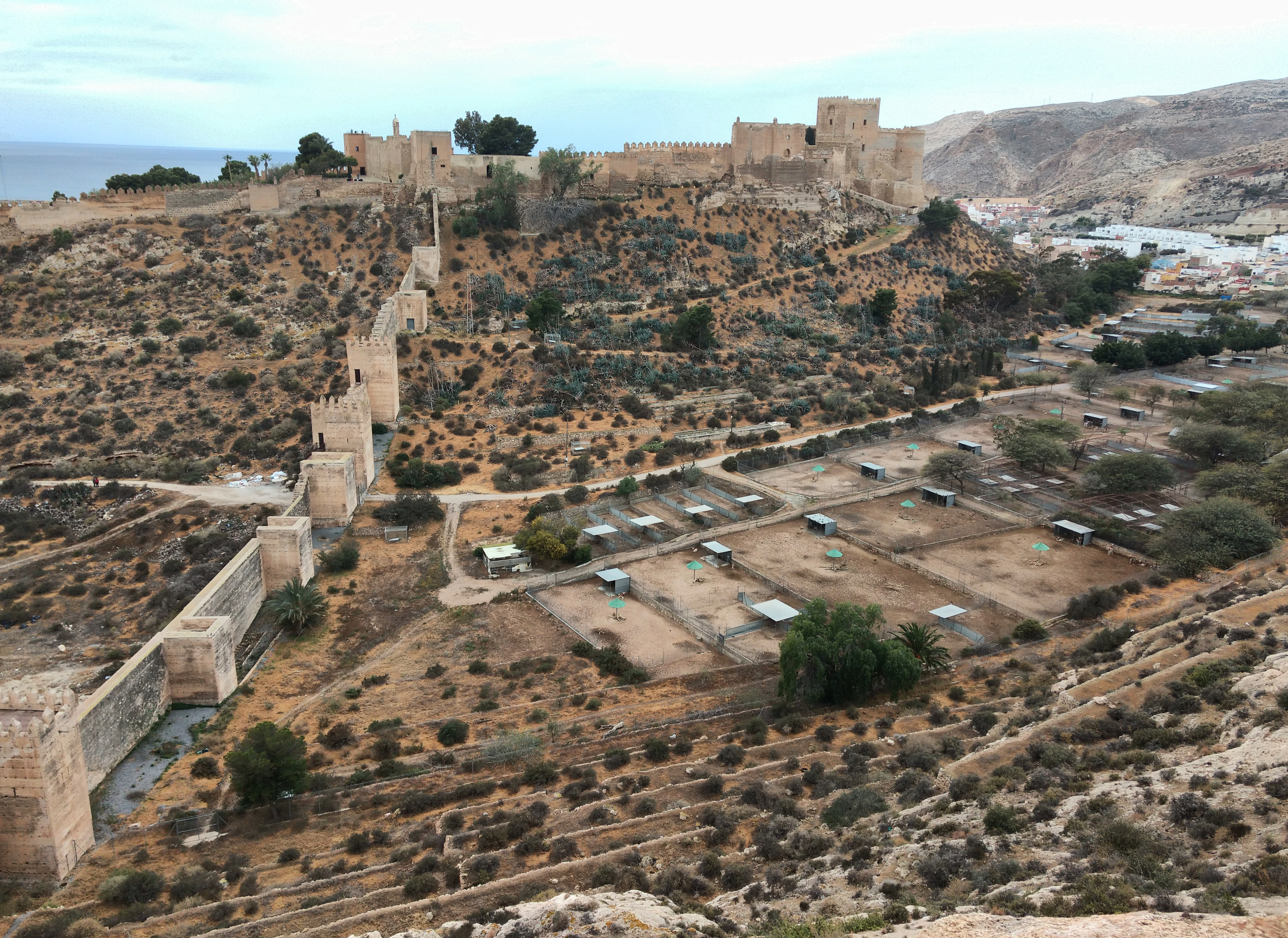 Muralla de Jairán y Finca Experimental «La Hoya» de la Estación Experimental de Zonas Áridas (EEZA).